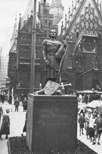 Prezentacja pomnika Henryka Probusa.